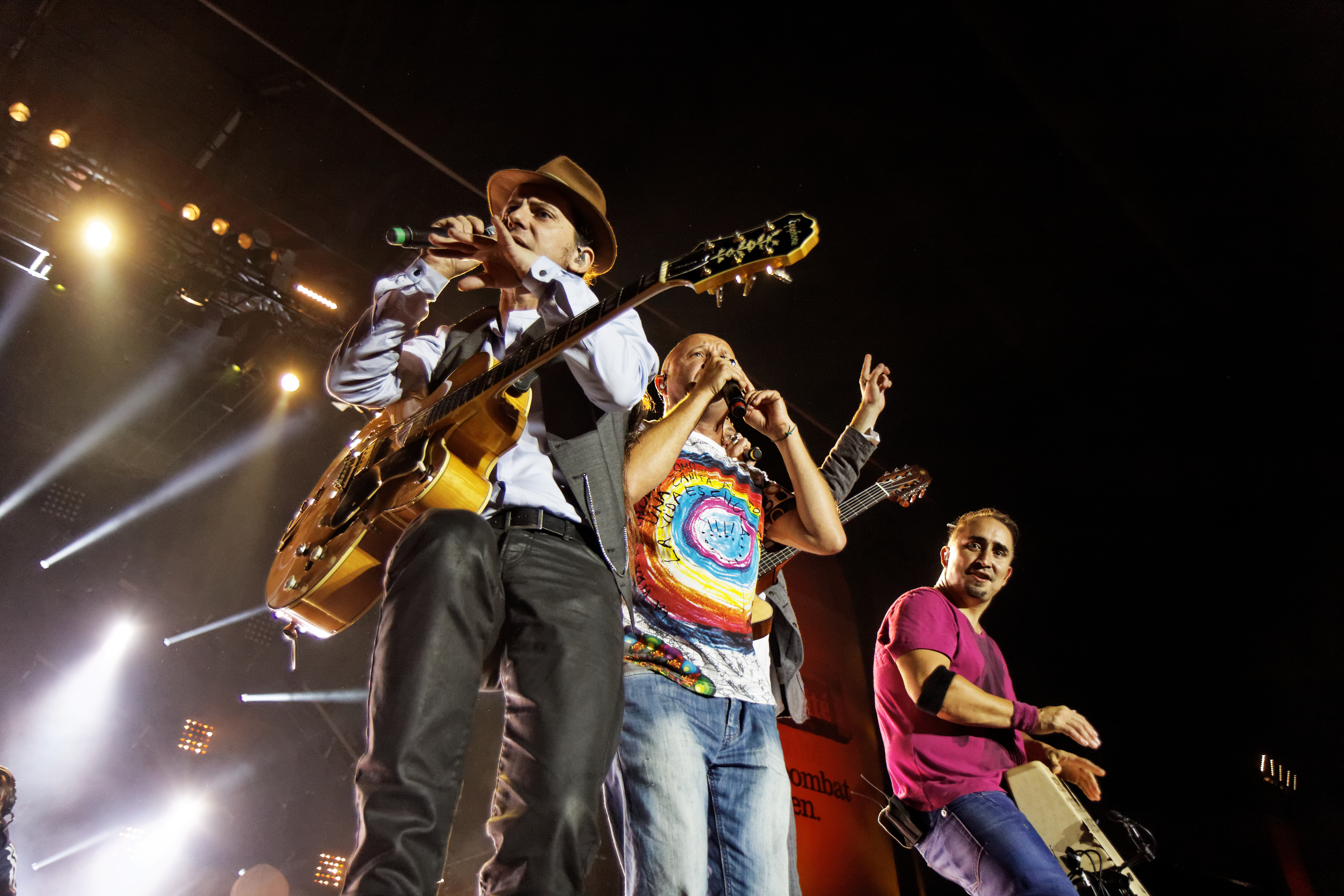 Tryo en concert sur la grande scène lors de la fête de l'Humanité 2013.